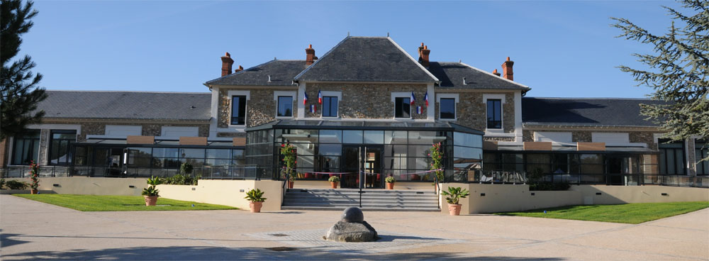 Entrée de la mairie du Coudray-Montceaux restaurée.